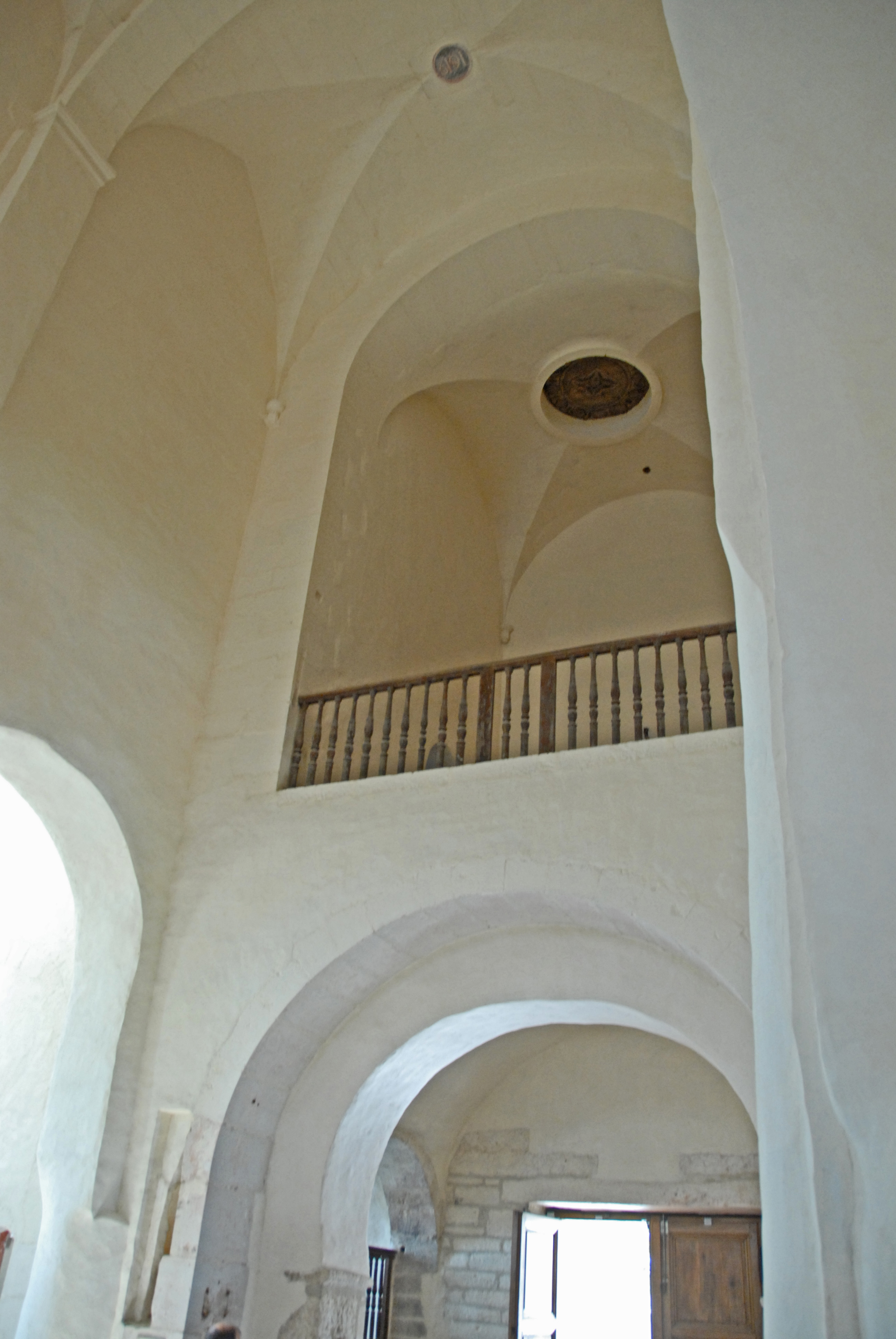 St-Vorles de Châtillon-s-S, Narthex mit Empore